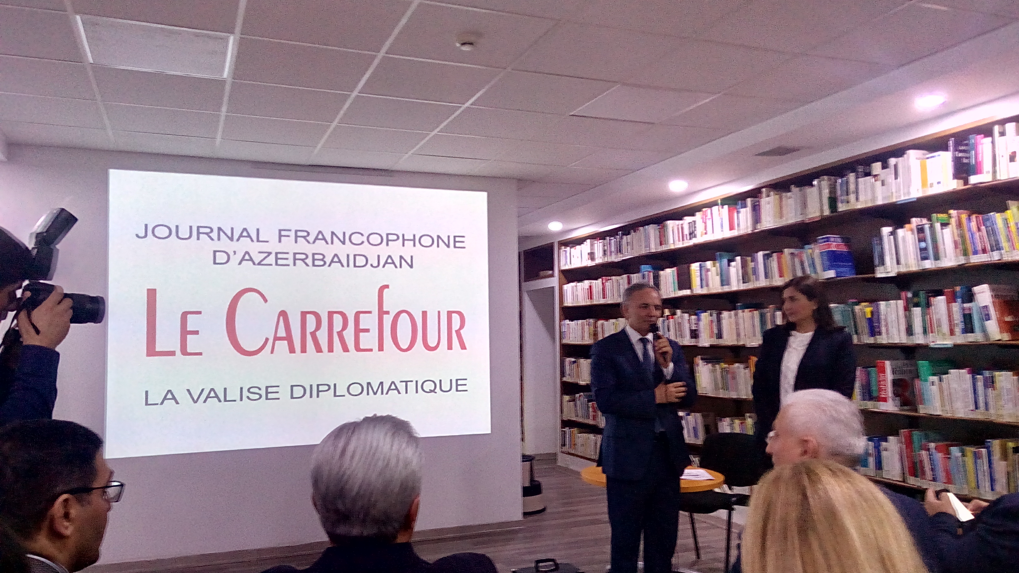 Azərbaycandakı Fransız İnstitutunda Le Carrefour qəzetinin təqdimatı